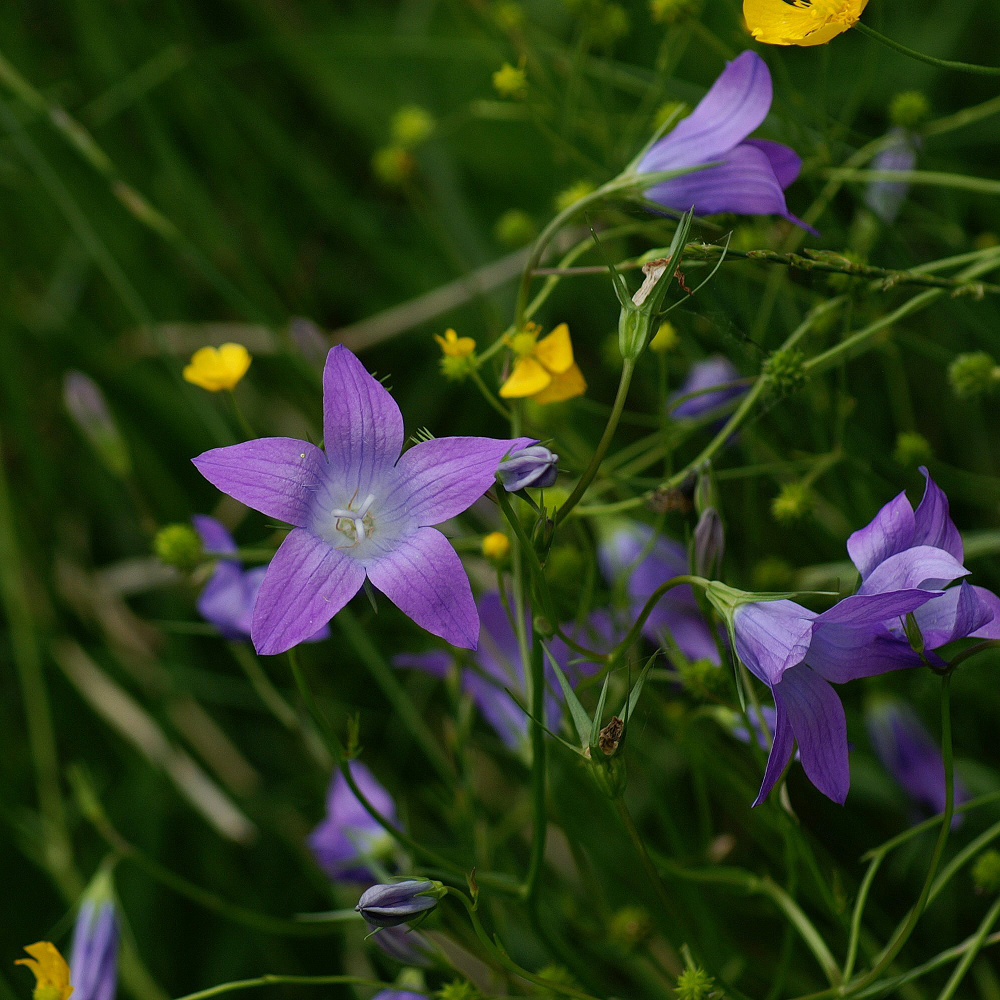 Die Wiesen-Glockenblume (Campanula patula) gehört zur Gattung der Glockenblumen. Gesehen in Partenen , Vorarlberg